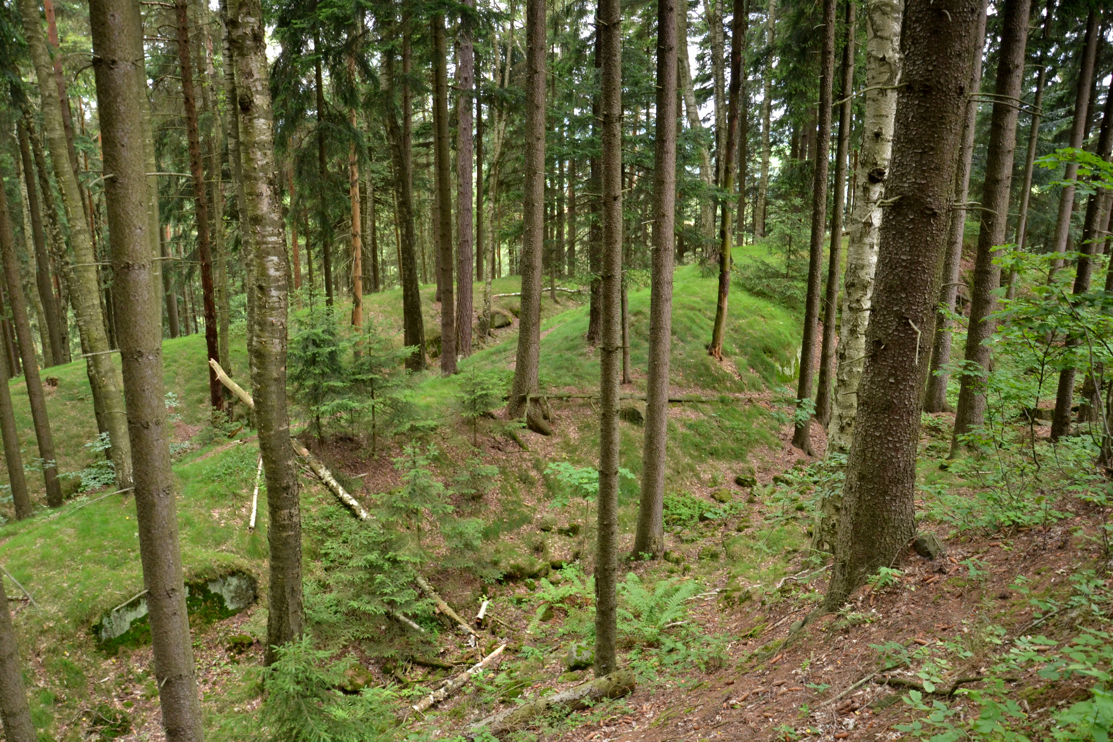 Valy a příkopy na jižní straně hradu